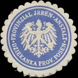 Sealing stamp Title: Provinzial Irren-Anstalt Dziekanka Provinz Posen Description: blau, weiß, geprägt Place: Dziekanka size: 4 cm